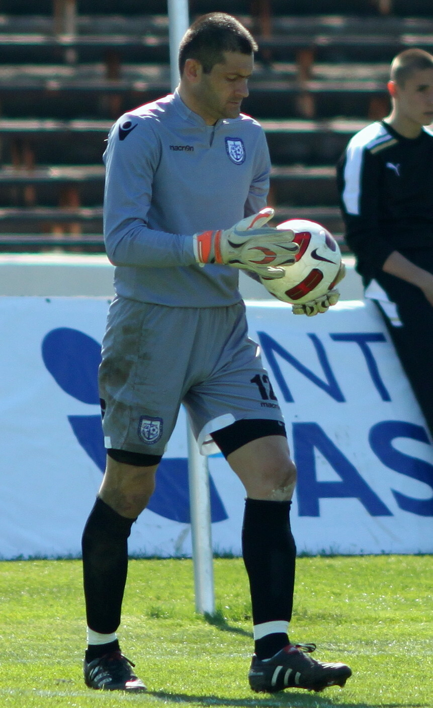 Стоян Колев Петров е български футболист, вратар, състезател на Черноморец (Бургас).